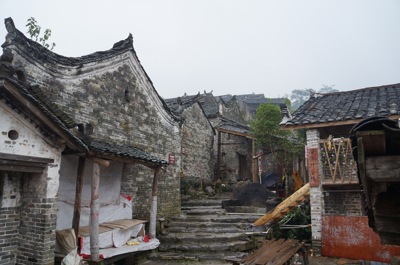 千年瑶寨南岗排20151004